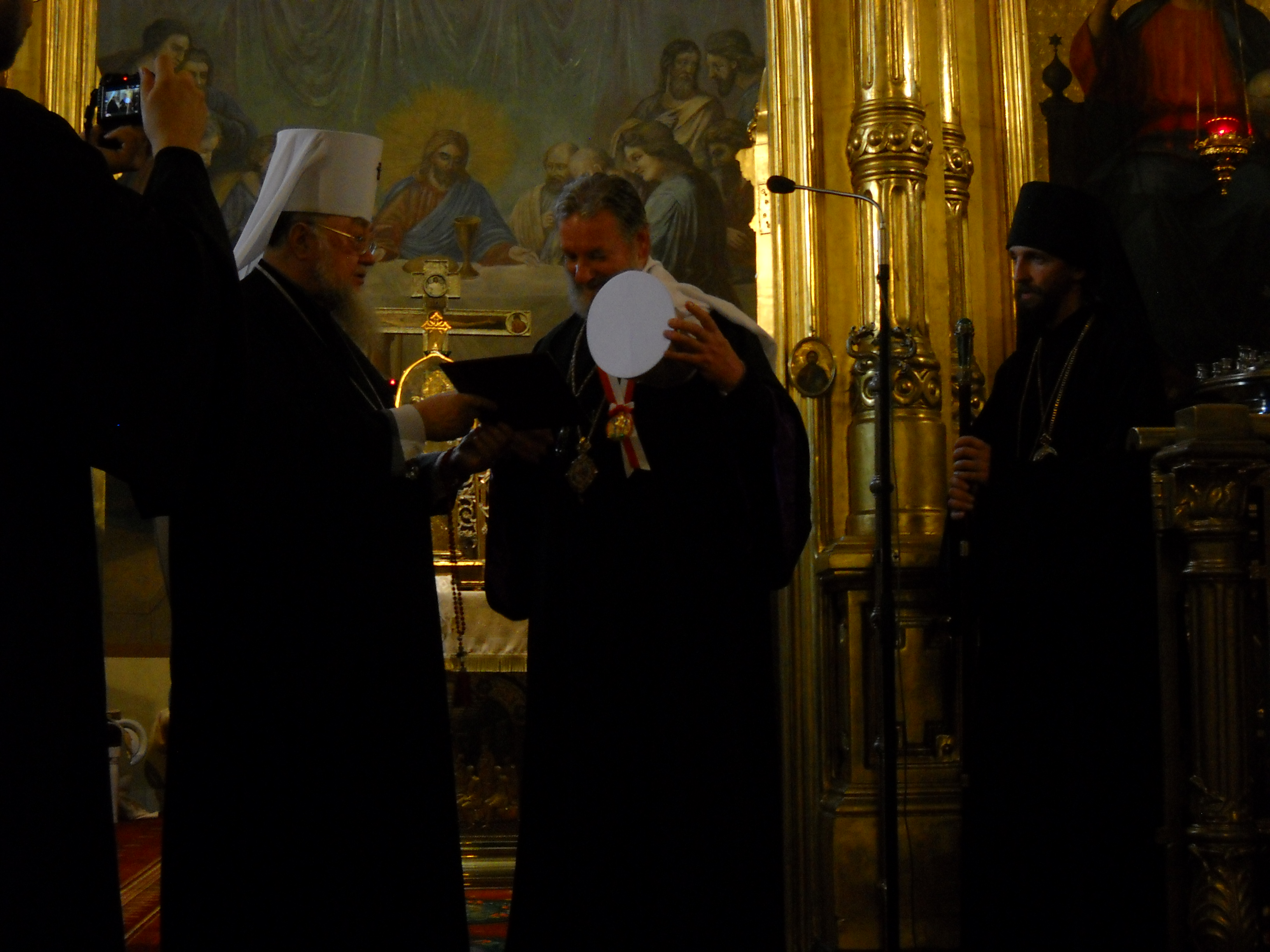 Metropolita Sawa wręcza metropolicie Czech i Słowacji Krzysztofowi Order św. Równej Apostołom Marii Magdaleny